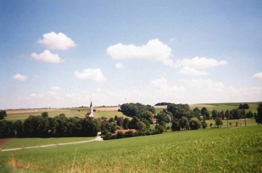 Frauenornau von Westen